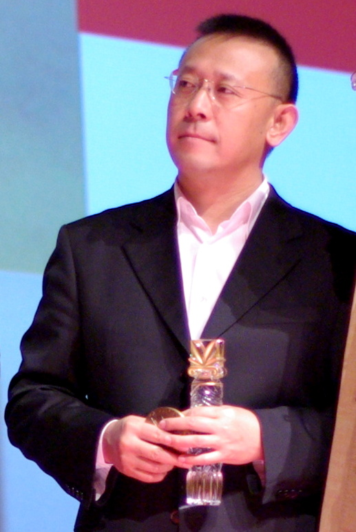 Jiang Wen au festival du film asiatique de Deauville